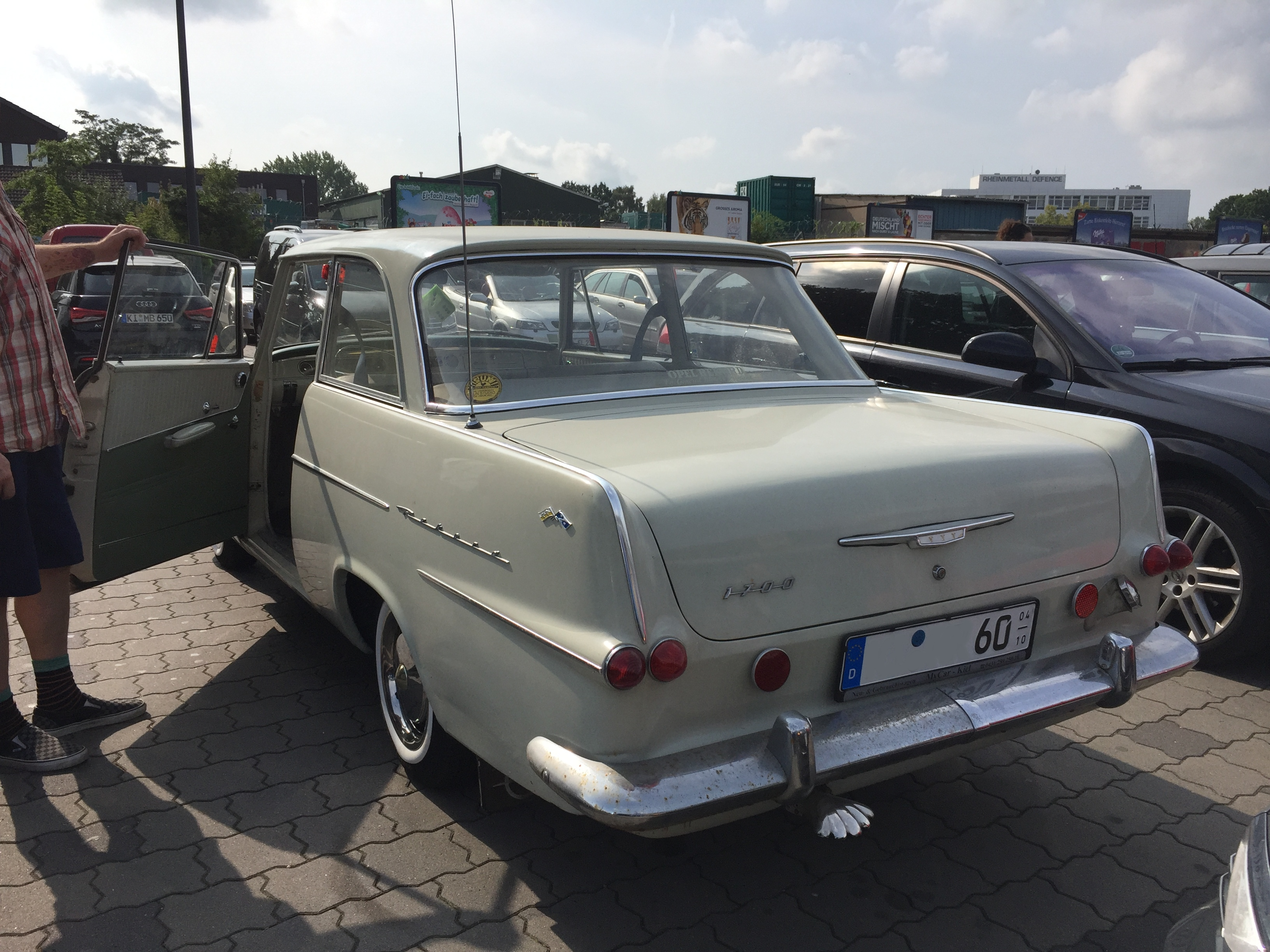 Opel Rekord P2 1700 Heckansicht